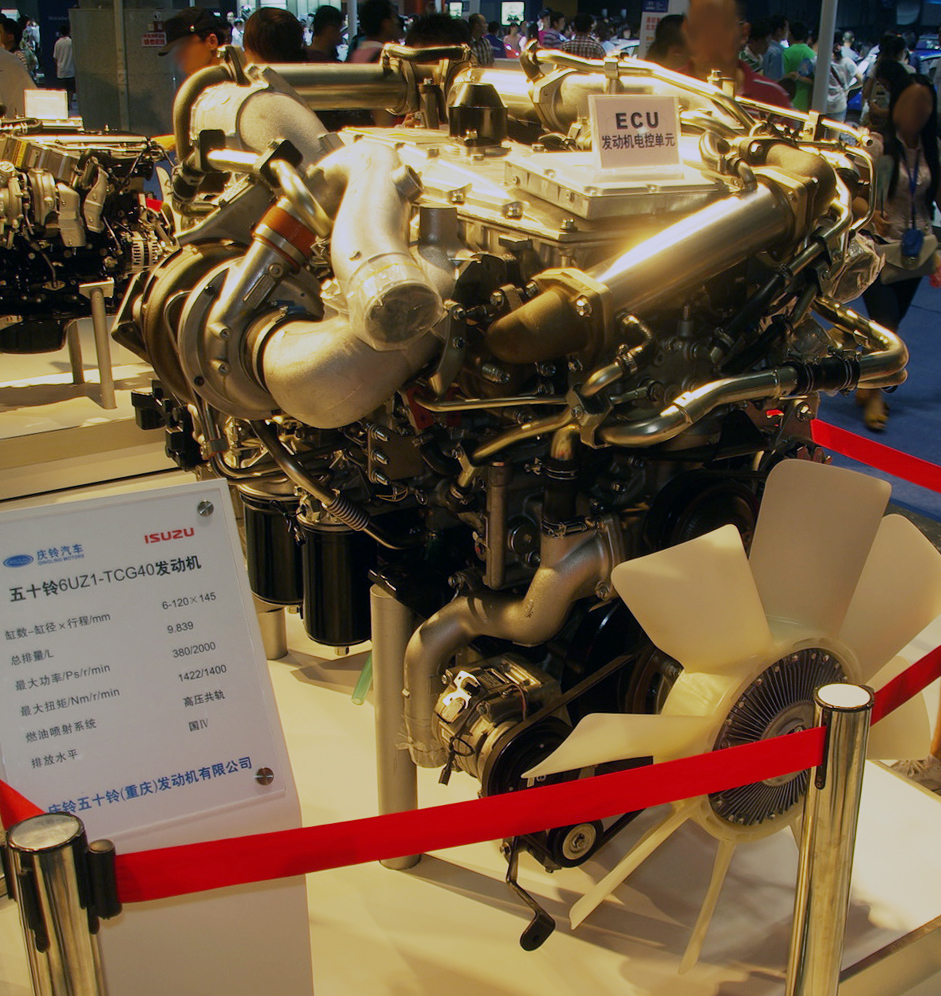 Isuzu 6UZ1-TCG40 six-cylinder, 9.8 L diesel truck engine